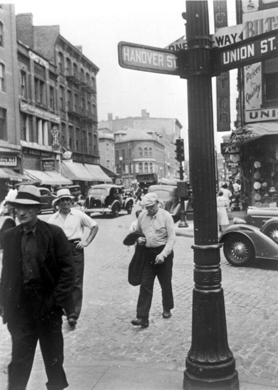 Vereinigte Staaten, Massachusetts, Boston, Hannoverstrasse